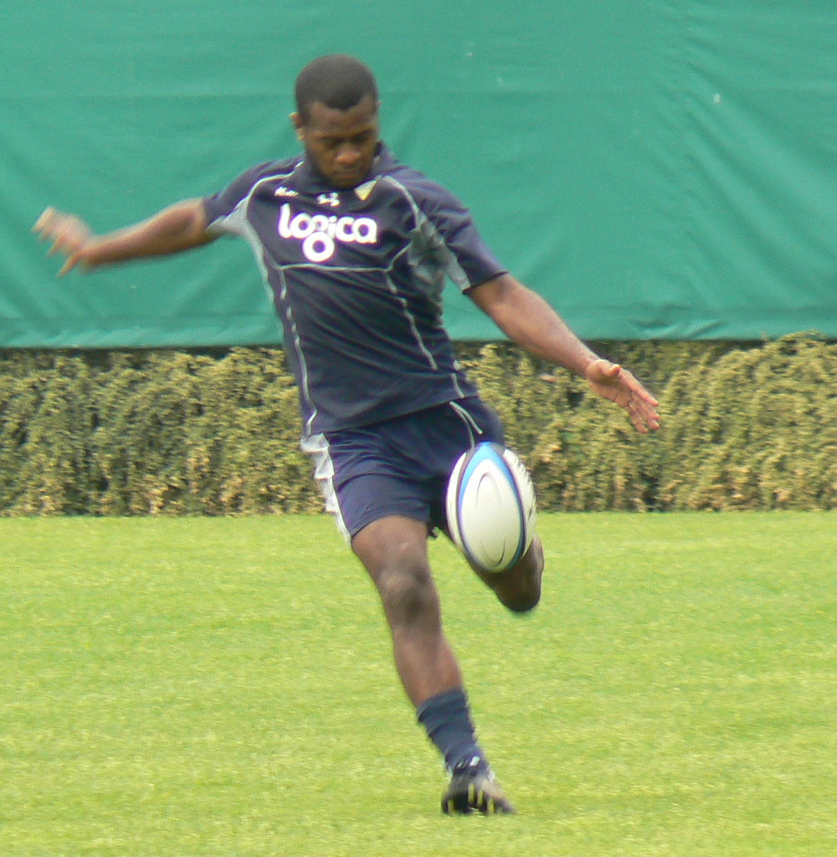 Le rugbyman fidjien Kini Murimurivalu lors d'un entraînement avec l'ASM Clermont Auvergne.